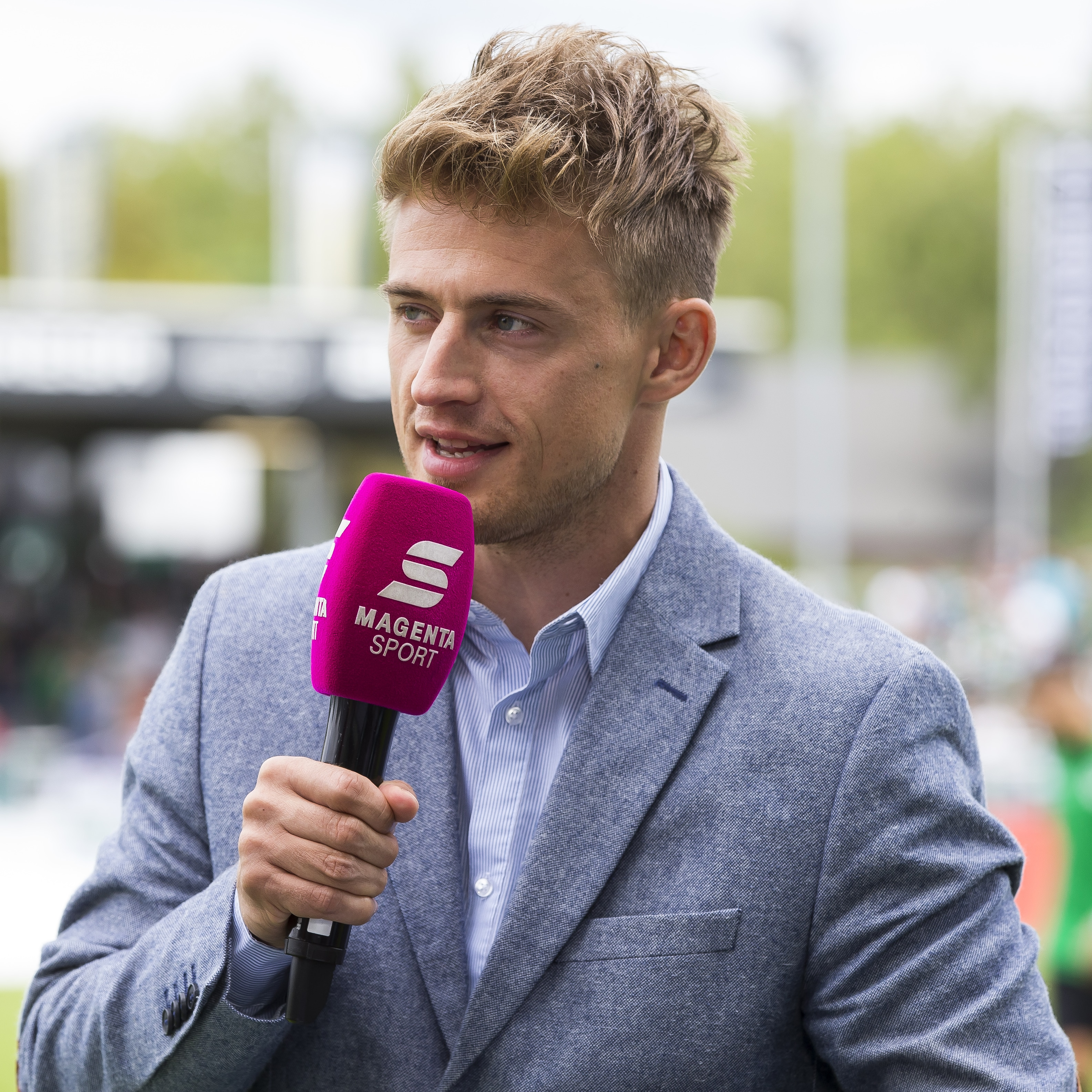 Moderator Cedric Pick moderiert in Münster für den TV-Sender Magenta Sport